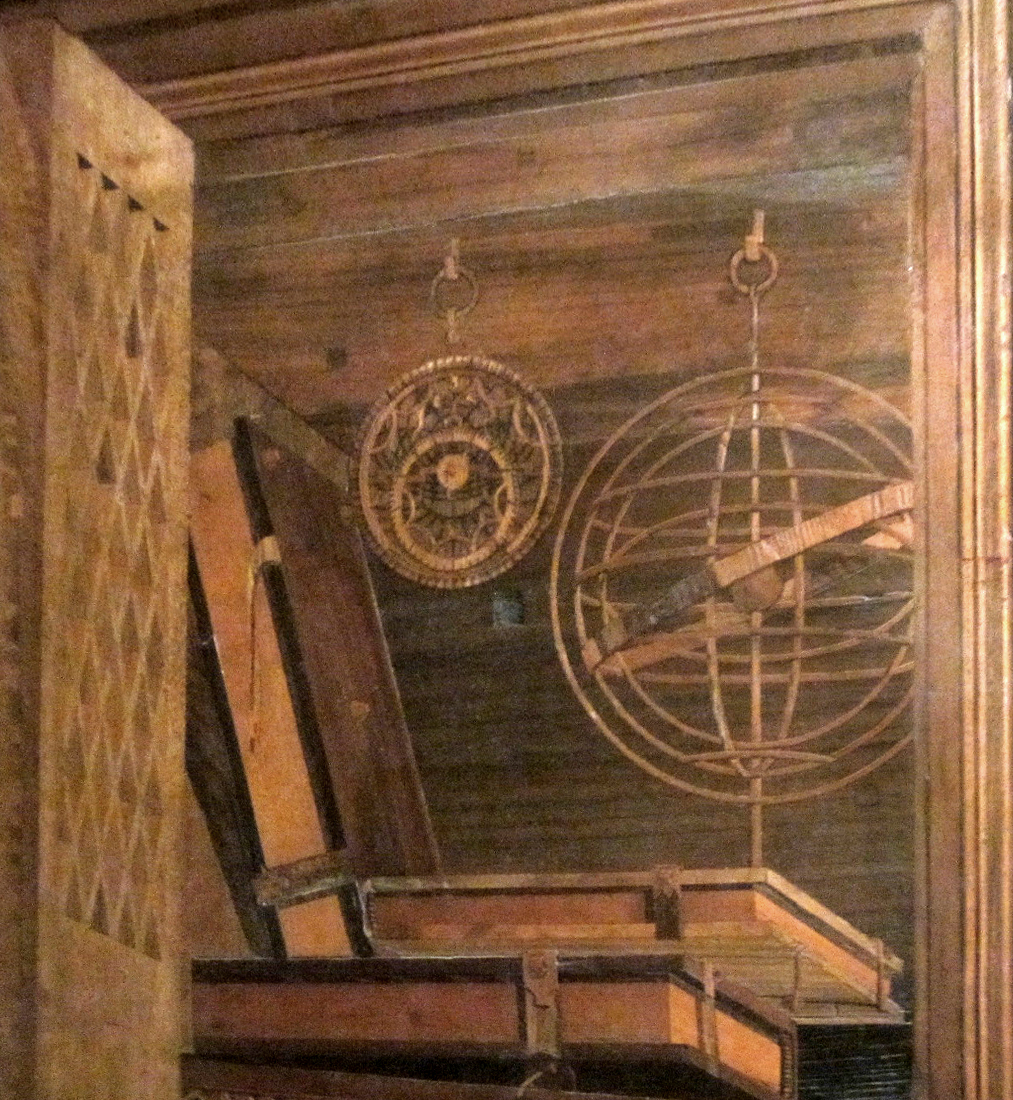 Palazzo Ducale di Urbino - Galleria Nazionale delle Marche - MIBAC This is a photo of a monument which is part of cultural heritage of Italy.